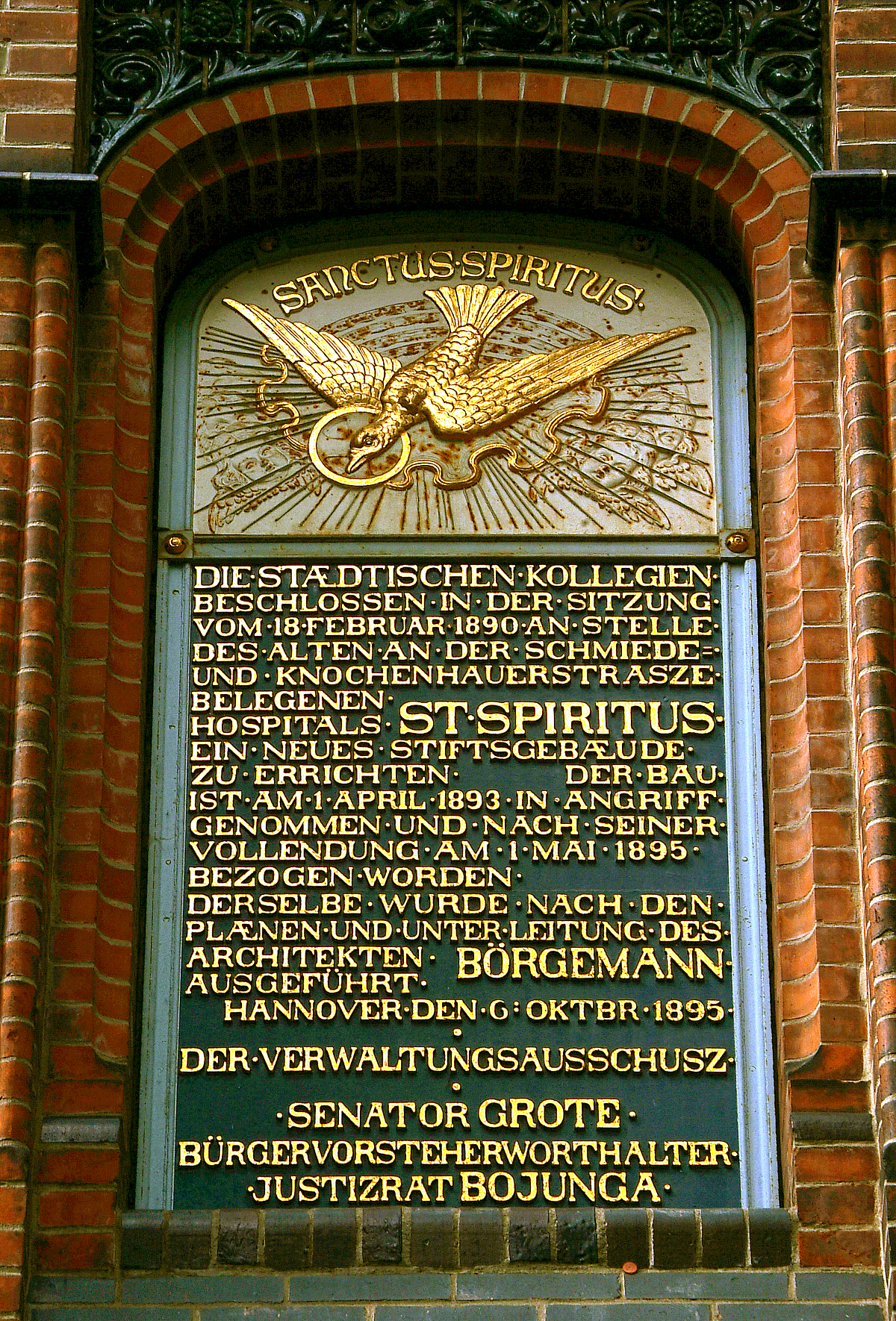 Gedenktafel von 1895 über dem Haupteingangs-Portal des seinerzeit neu errichteten Stifts zum Heiligen Geist. "Sanctus Spiritus. Die städtischen Kollegien beschlossen in der Sitzung vom 18. Februar 1890 an Stelle des alten an der Schmiede- und Knochenhauerstraße belegenen Hospitals St. Spiritus ein neues Stiftsgebäude zu errichten. Der Bau ist am 1. April 1893 in Angriff genommen worden und nach seiner Vollendung am 1. Mai 1895 bezogen worden. Derselbe wurde nach den Plänen und unter Leitung des Architekten BÖRGEMANN ausgeführt. Hannover, den 6. Oktobr. 1895, der Verwaltungsausschusz, Senator GROTE, Bürgervorsteherworthhalter, Justizrat BOJUNGA." ...